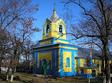 Храм Воздвиження Чесного і Животворящого Хреста Господнього (Велике Плоске) Великомихайлівського району на Одещині